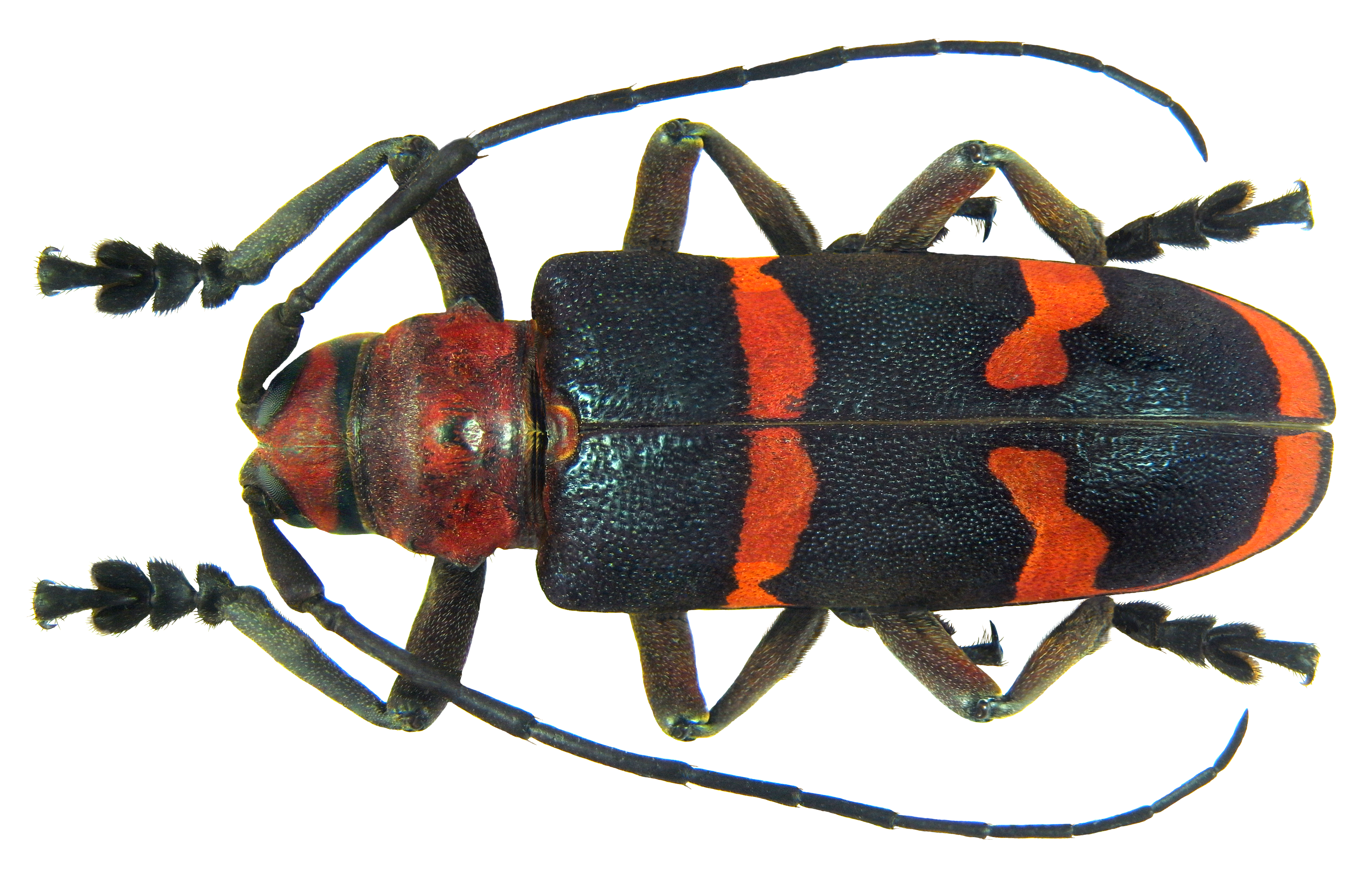 Family: Cerambycidae Size: 30 mm Location: Senegal, 14 km south `M Bour U.Schmidt leg, 8-20. X.1992; det. K.Adlbauer, 2010 Photo: U.Schmidt, 2012